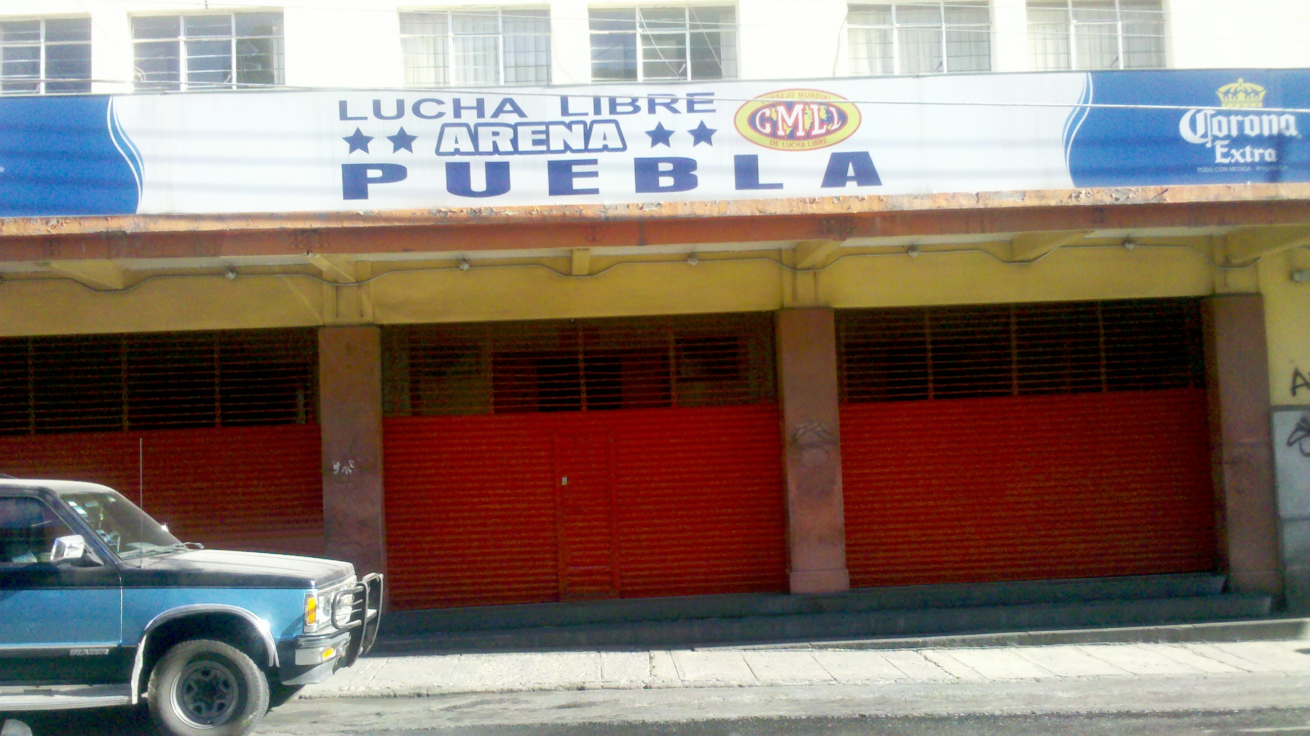 Arena Puebla de lucha libre, Puebla, México. Esquina de la 13 oriente y 4 sur.